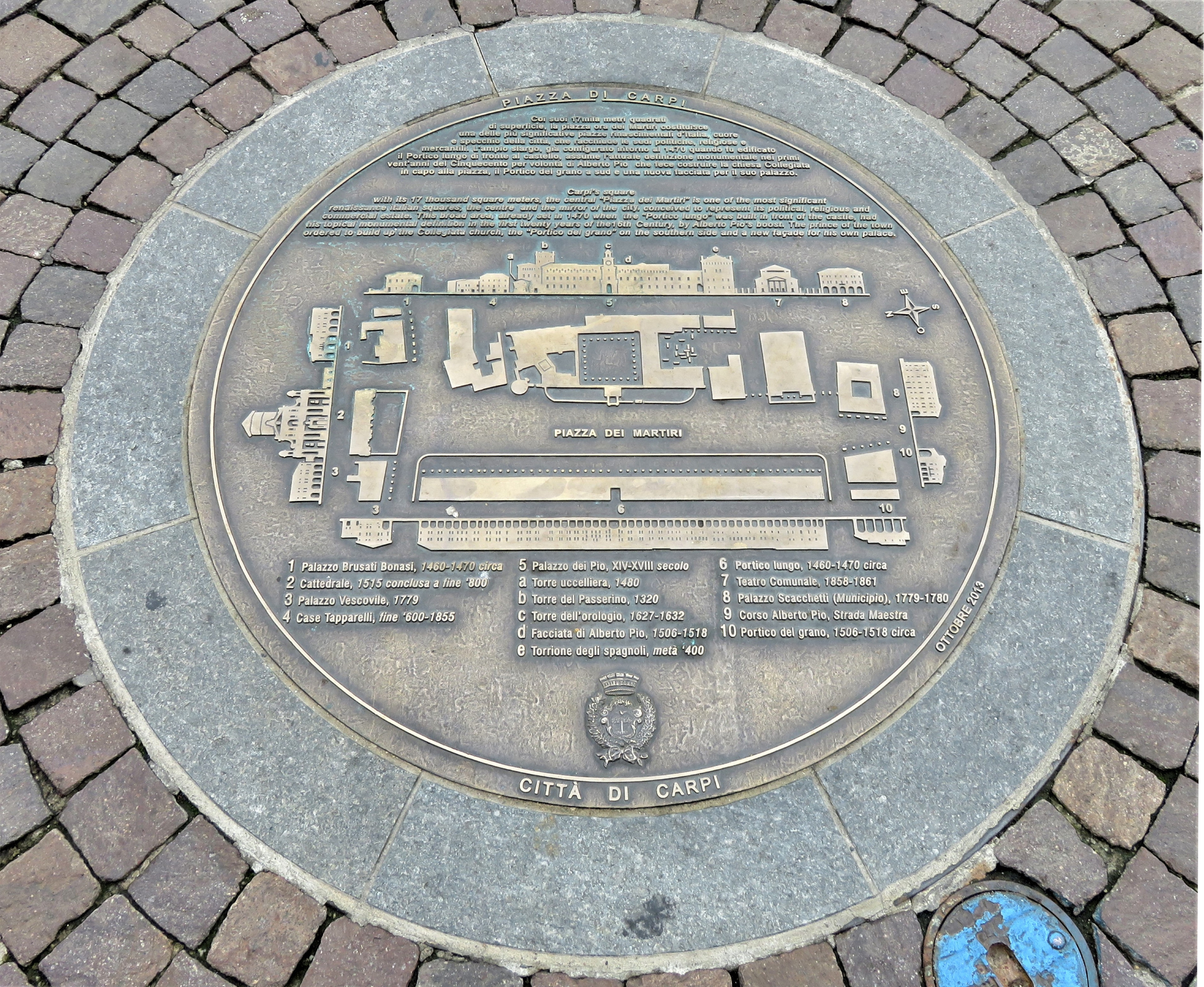 Piazza dei Martiri, targa con pianta della città